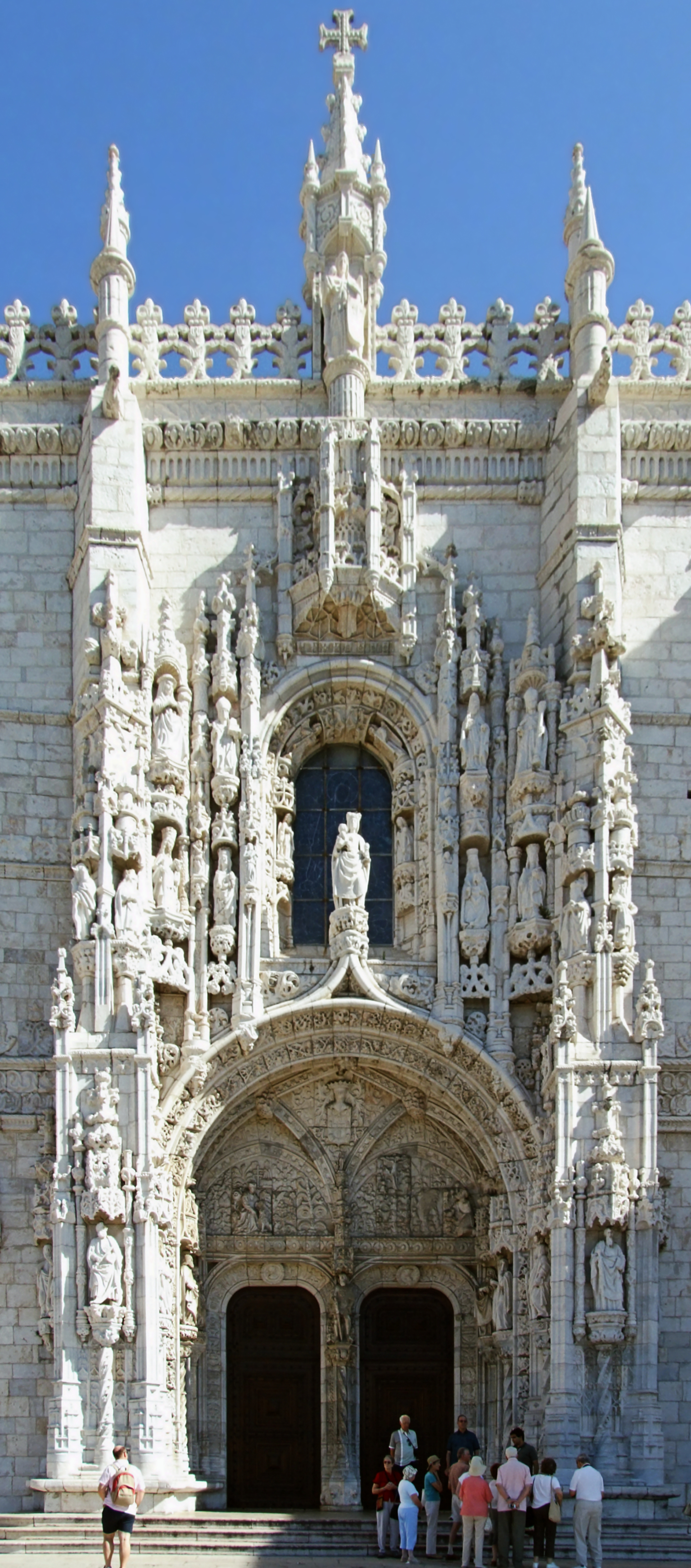 Portal południowy kaplicy klasztornej zespołu klasztornego hieronimitów